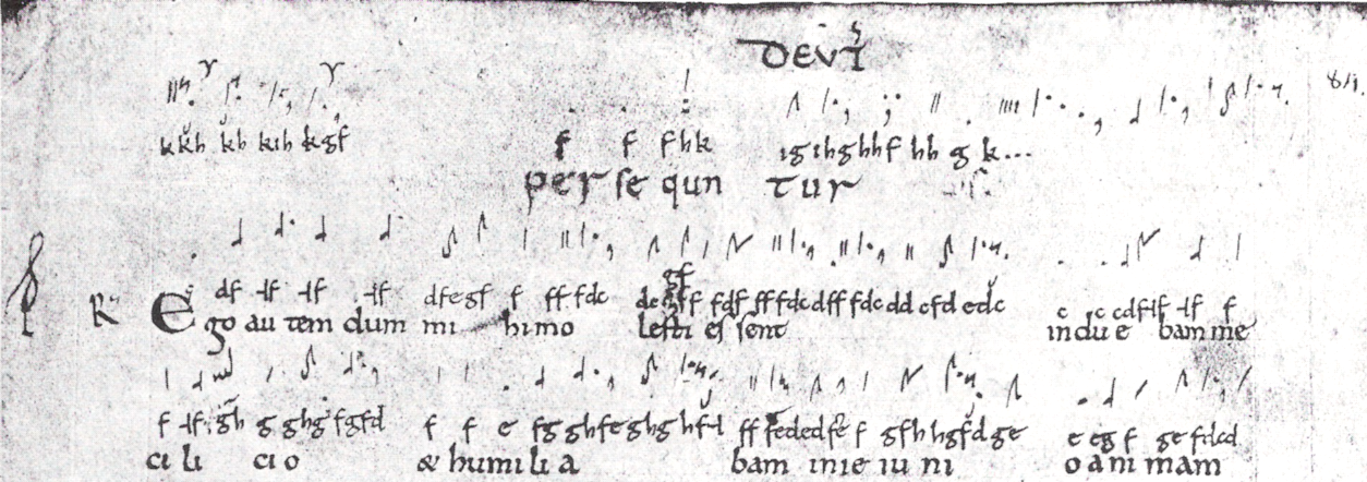 Darstellung des Deuterus an einer Melodie mit französischen Neumen und Tonbuchstaben (a bis p)